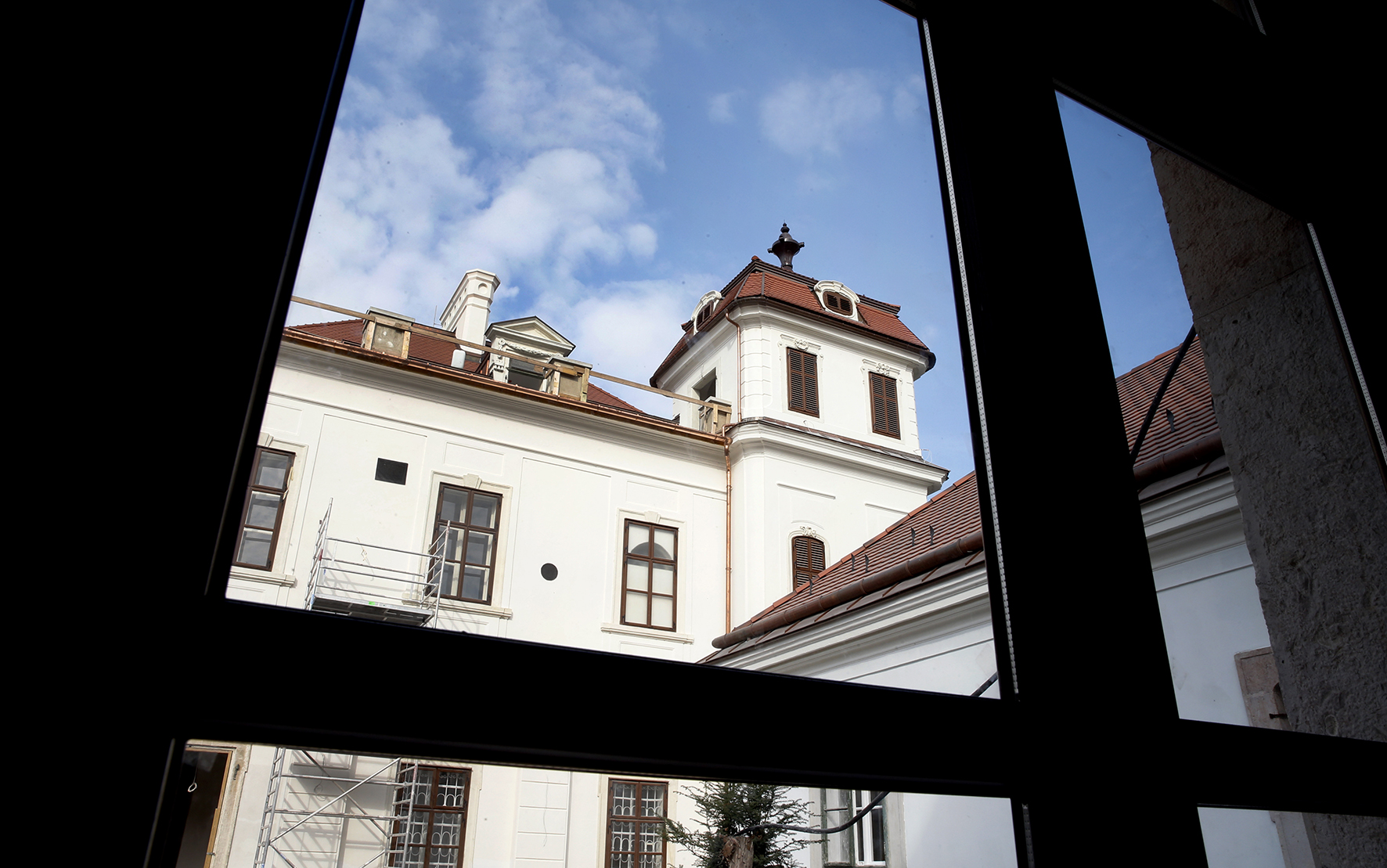 A tatai Esterházy-kastély felújítása a Nemzeti Kastélyprogram és Nemzeti Várprogram keretében.